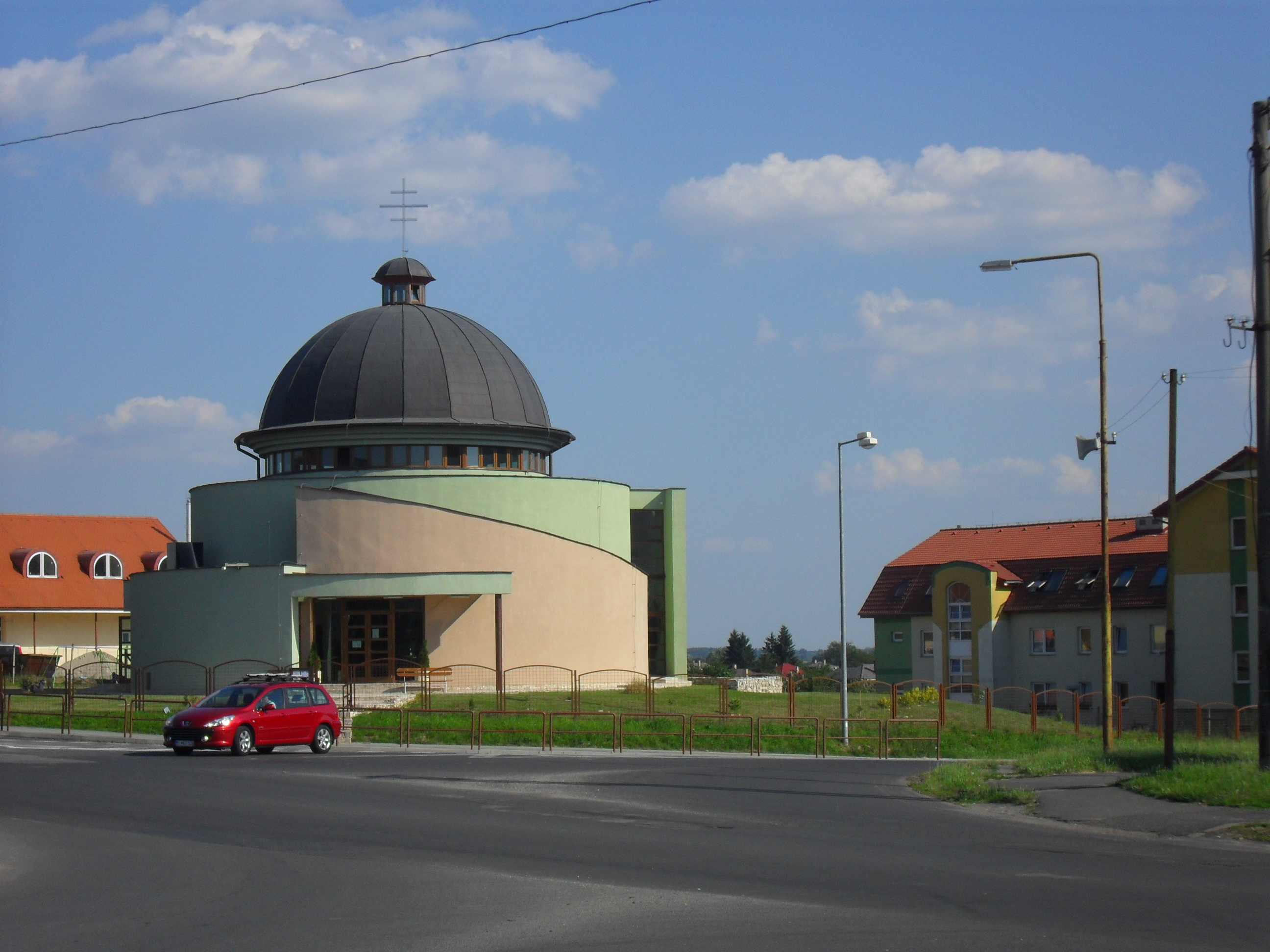 Nagykapos - Dobó István tér